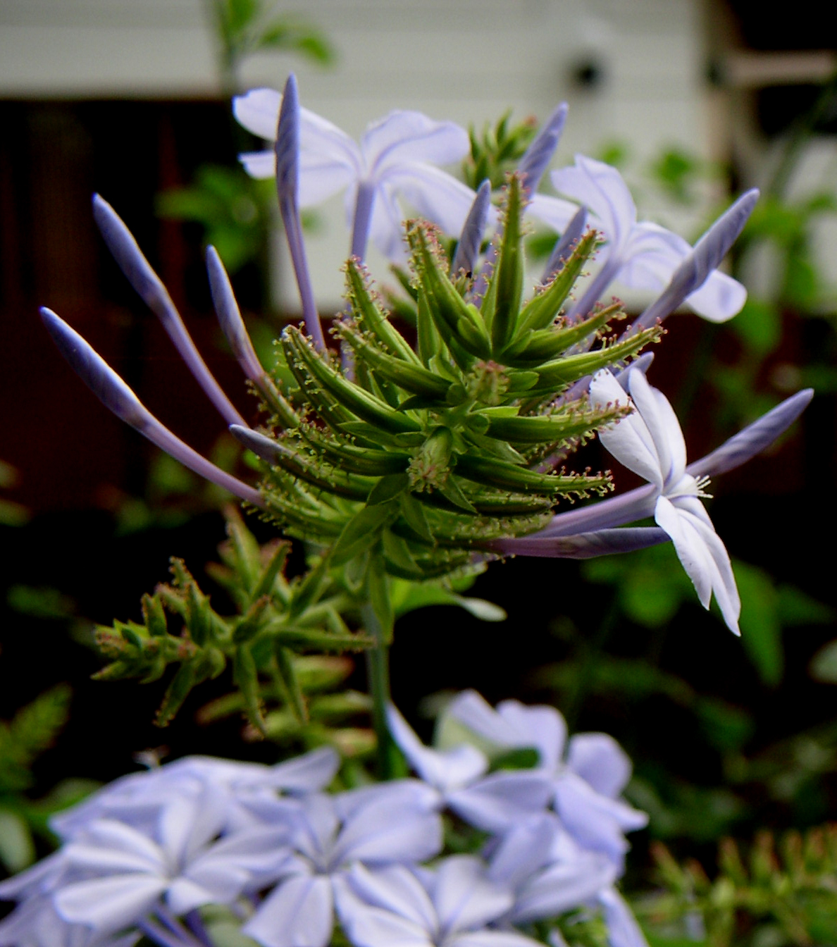 Plumbago auriculata, Plumbaginaceae, Cali / Kolumbien